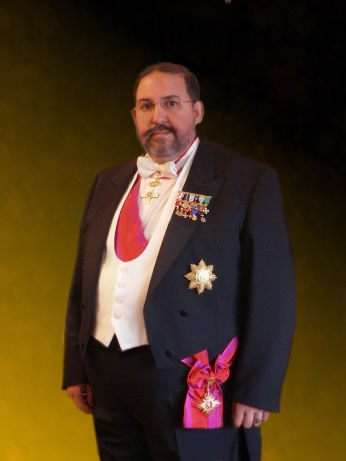 Vítor Manuel Escudero de Campos, é um investigador e académico português. Em 2007 foram reconhecidos os seus méritos e trabalhos, na defesa, divulgação e engrandecimento das relações culturais ibéricas, através da atribuição do Prémio Nacional de Estudos Hispânicos